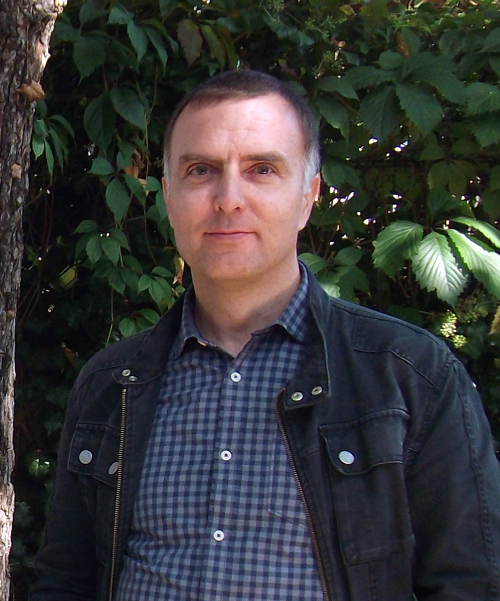 Professeur à l'Inalco, traducteur littéraire estonien/français